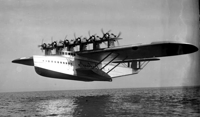 Was Deutschland an Reparationen gleistet hat ! Ein interessanter Ueberblick über die bisher geleisteten Sachlieferungen Deutschlands auf Reparations-Conto. Das grösste Flugboot der Welt auf Reparationsconto. Das Schwesterschiff der "Do X", welches an Italien abgeliefert wurde.